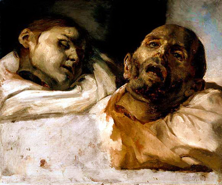 étude de têtes par Géricault, auteur du Radeau de la Méduse.